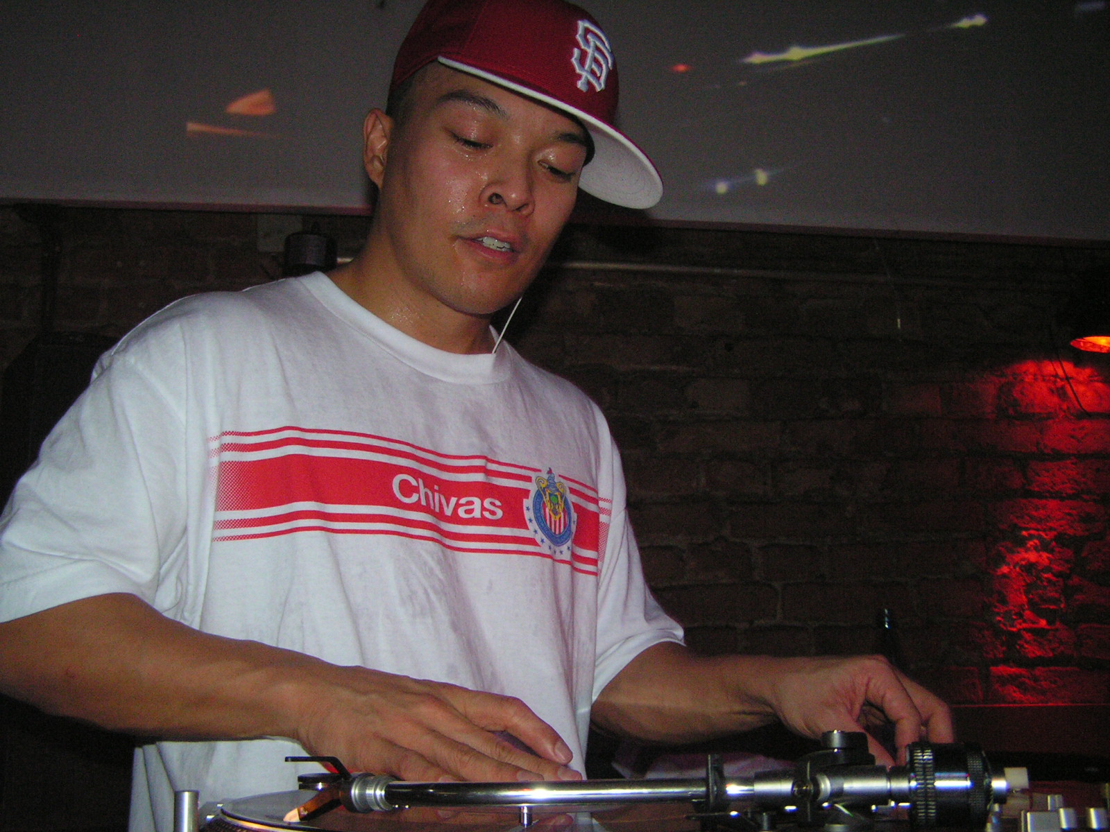 DJ QBert @ Icon, Berlin, 17.02.2008